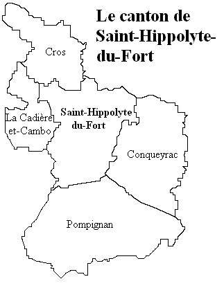 Le canton de Saint-Hippolyte du Fort Image personnelle